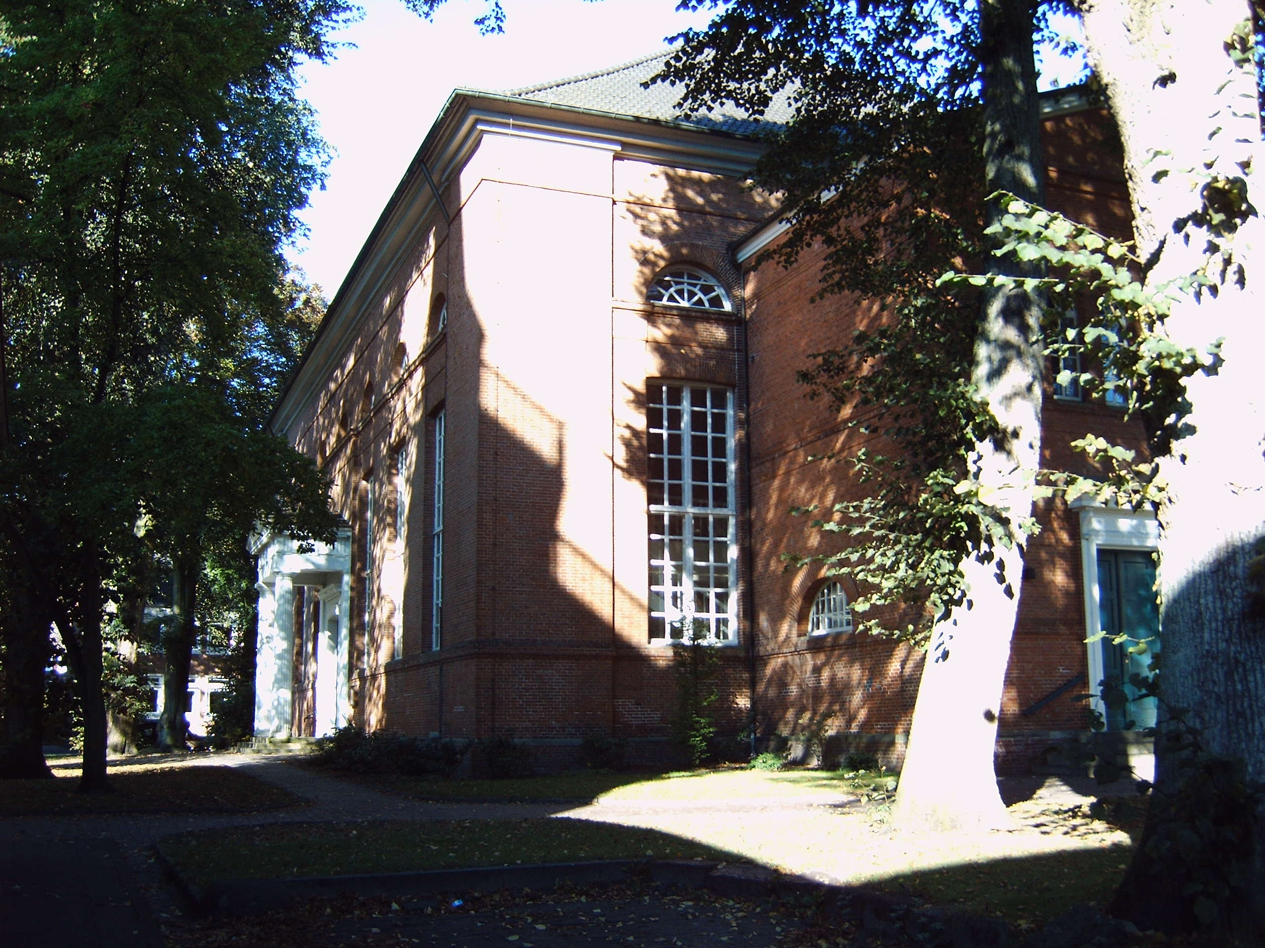 evangelische Lambertikirche in Aurich, Bild aufgenommen am 4.10.2005 von Olaf Meister